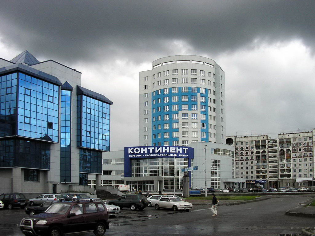 Торгово - развлекательный центр Континент